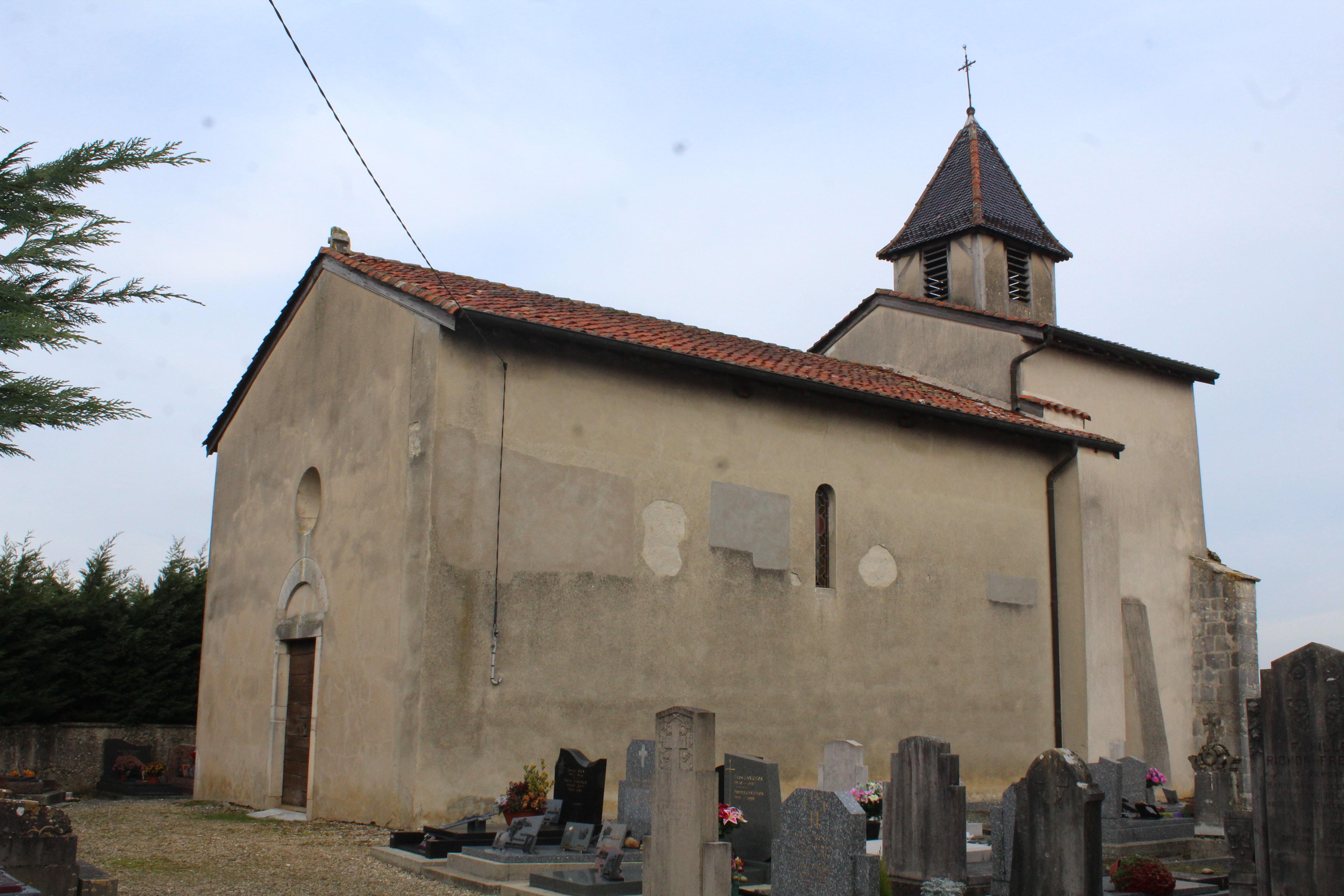 Église Saint-Georges de Saint-Georges-sur-Renon.